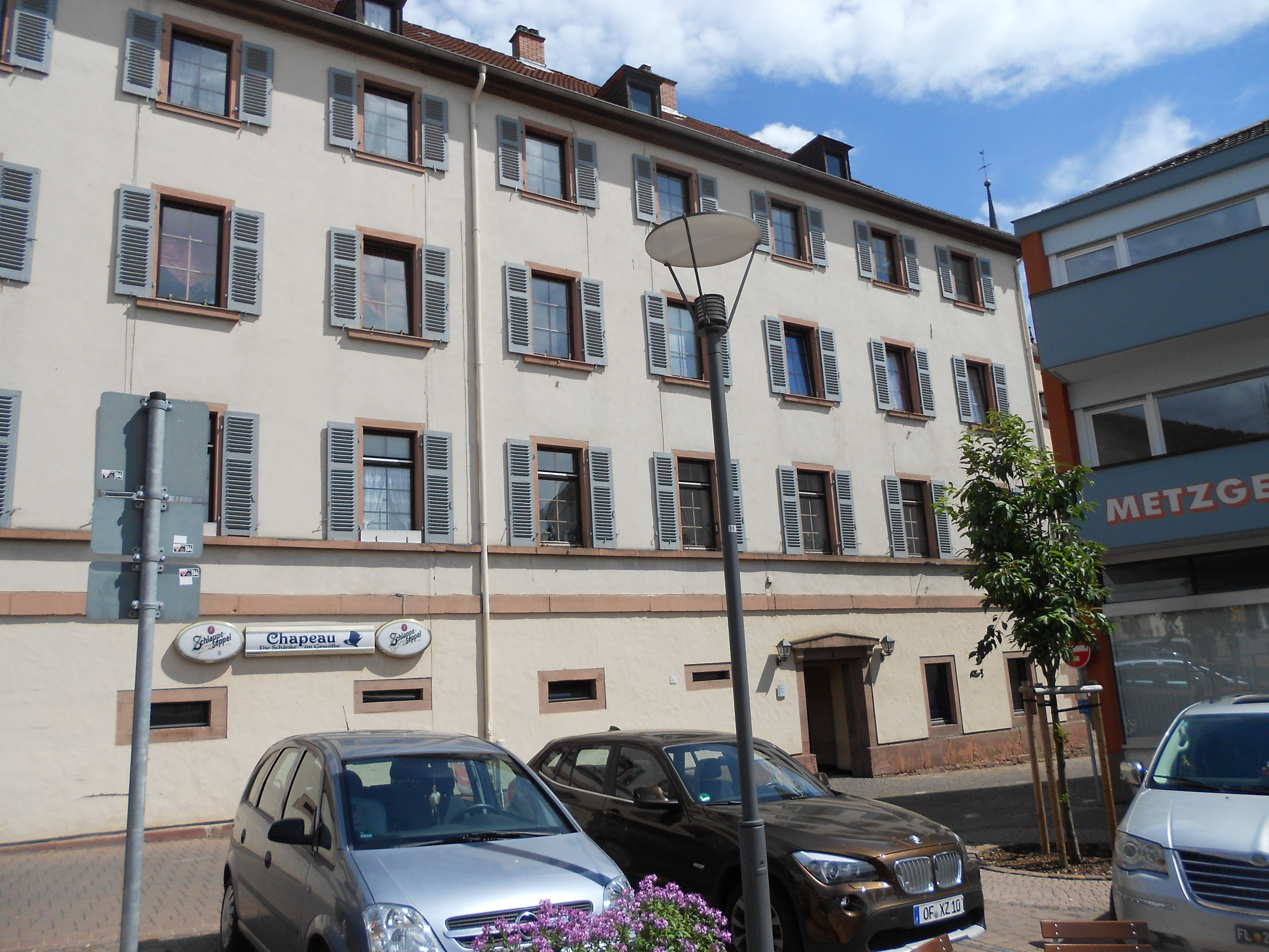 Ehemaliges Amtsgericht in Klingenberg am Main, Landgericht, 1832 erbaut, 1879-1931 Amtsgericht, Hauptstraße 5, Akten Nr. D-6-76-134-6